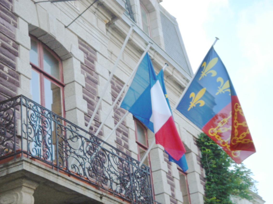 Mairie de Palais (56) Pavois avec pavillons France, Europe, Palais